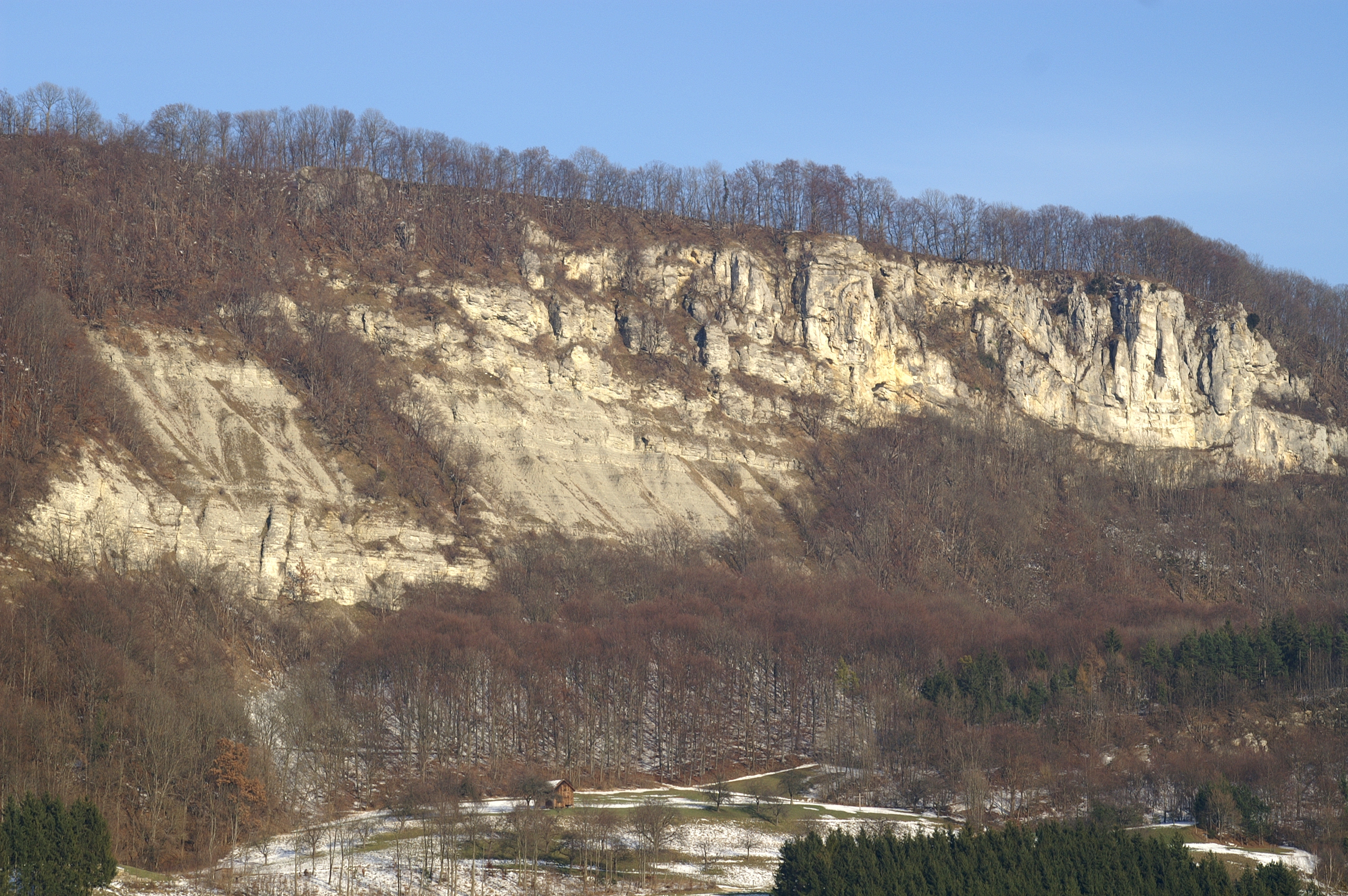 Naturschutzgebiet Hausener Wand